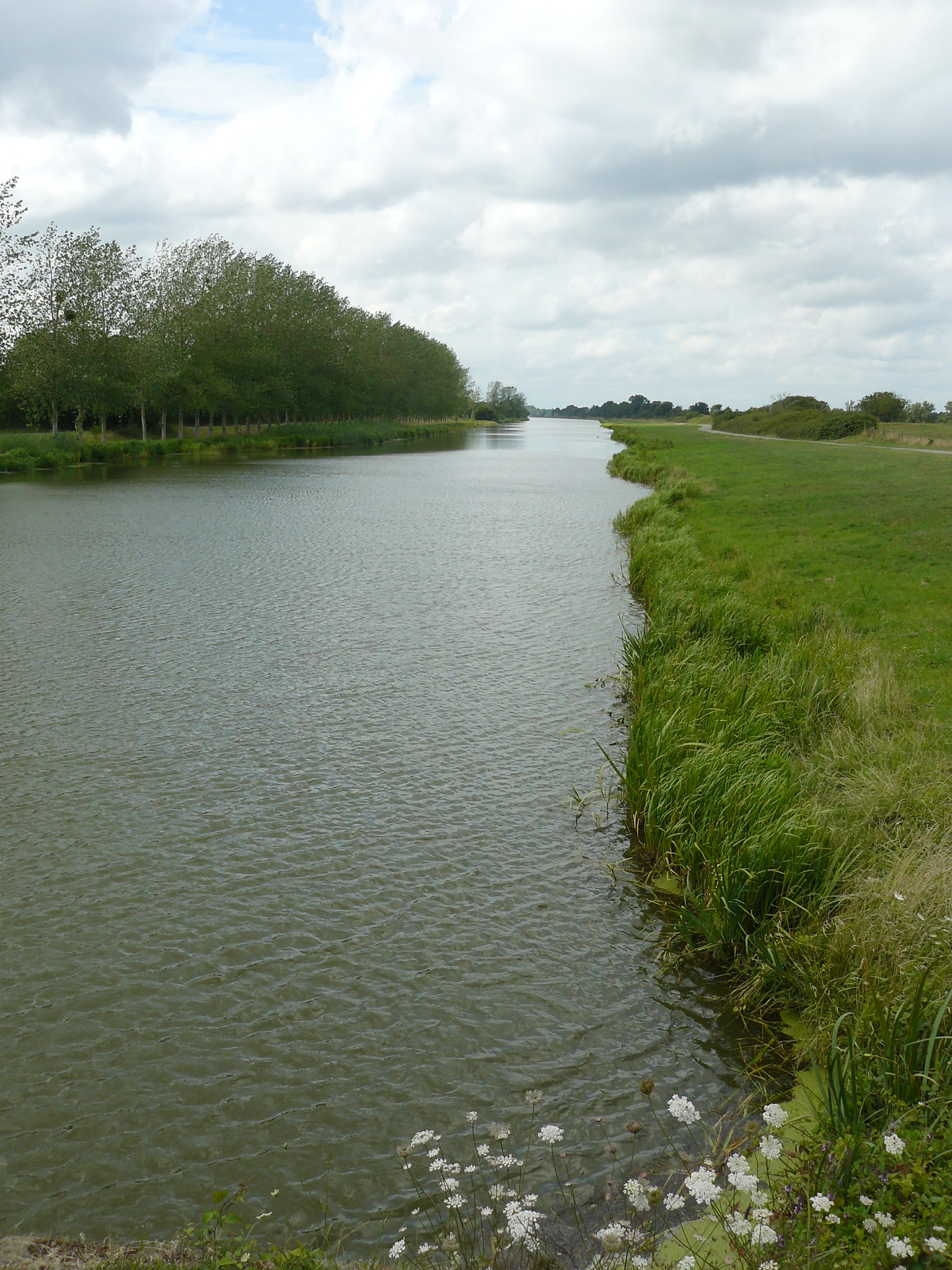 Canal de la Martinière, au niveau de la Machinerie des Champs Neufs, Frossay